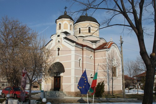 Orthodoxe Kirche "St. Archangel Michail" erbaut 1905 bis 1908.